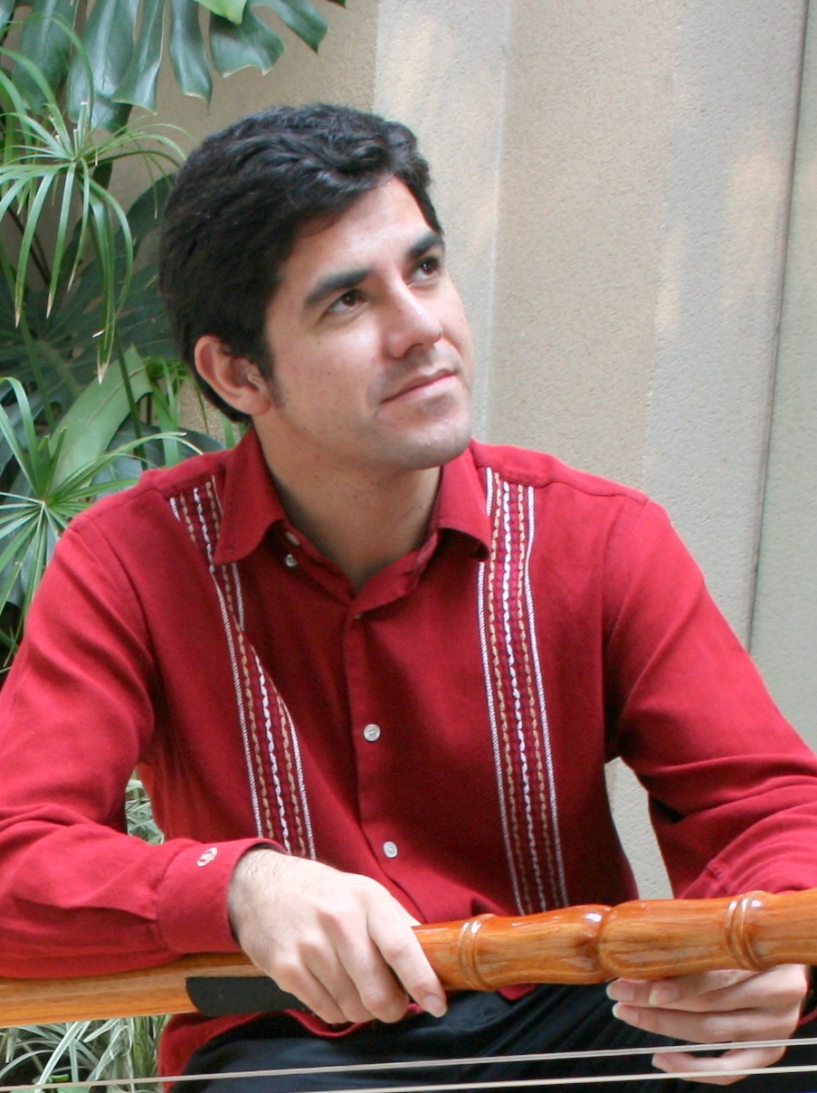 Arpista paraguayo Kike Pedersen